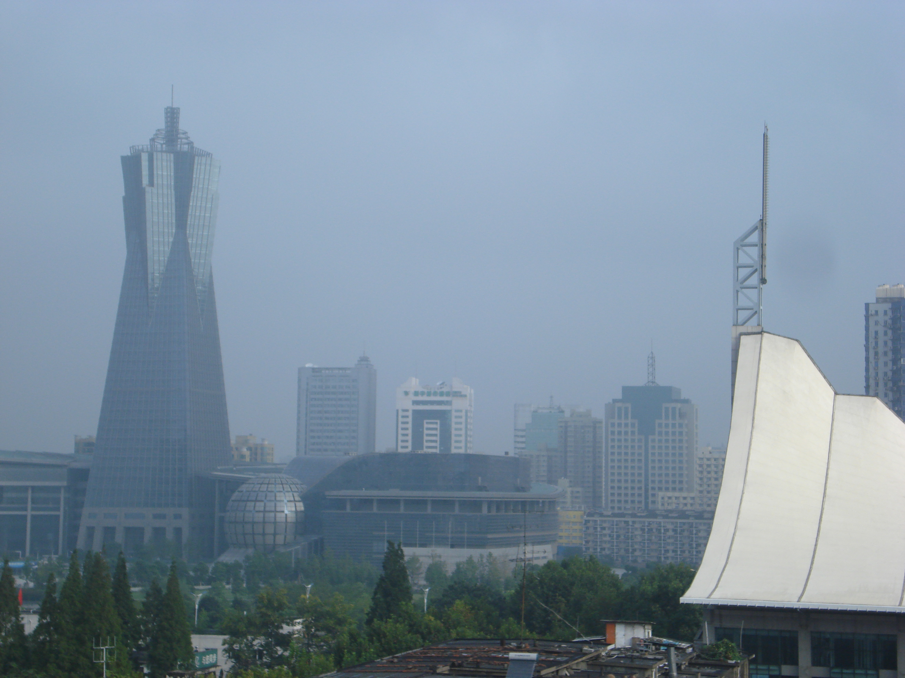 Хангџоу, Кина. 16. септембар 2008. снимио: Јакша П.